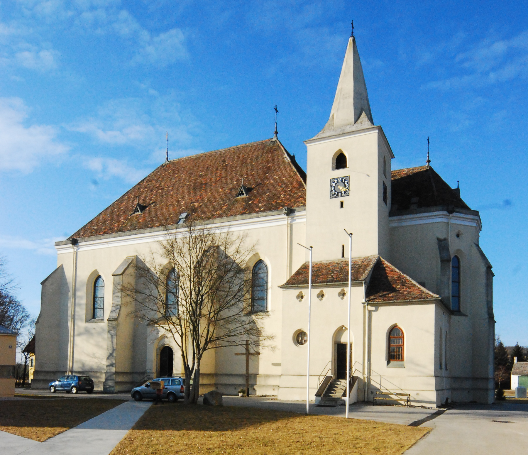 katholische Pfarrkirche heilige Afra